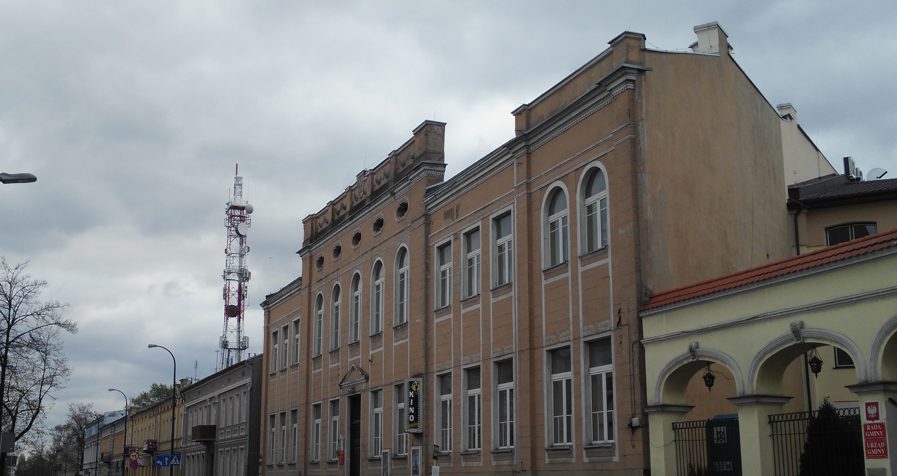 Budynek elitarnego Klubu Miejskiego z 1904 roku. Obecnie biblioteka miejska i najstarsze działające w mieście kino "Włókniarz"